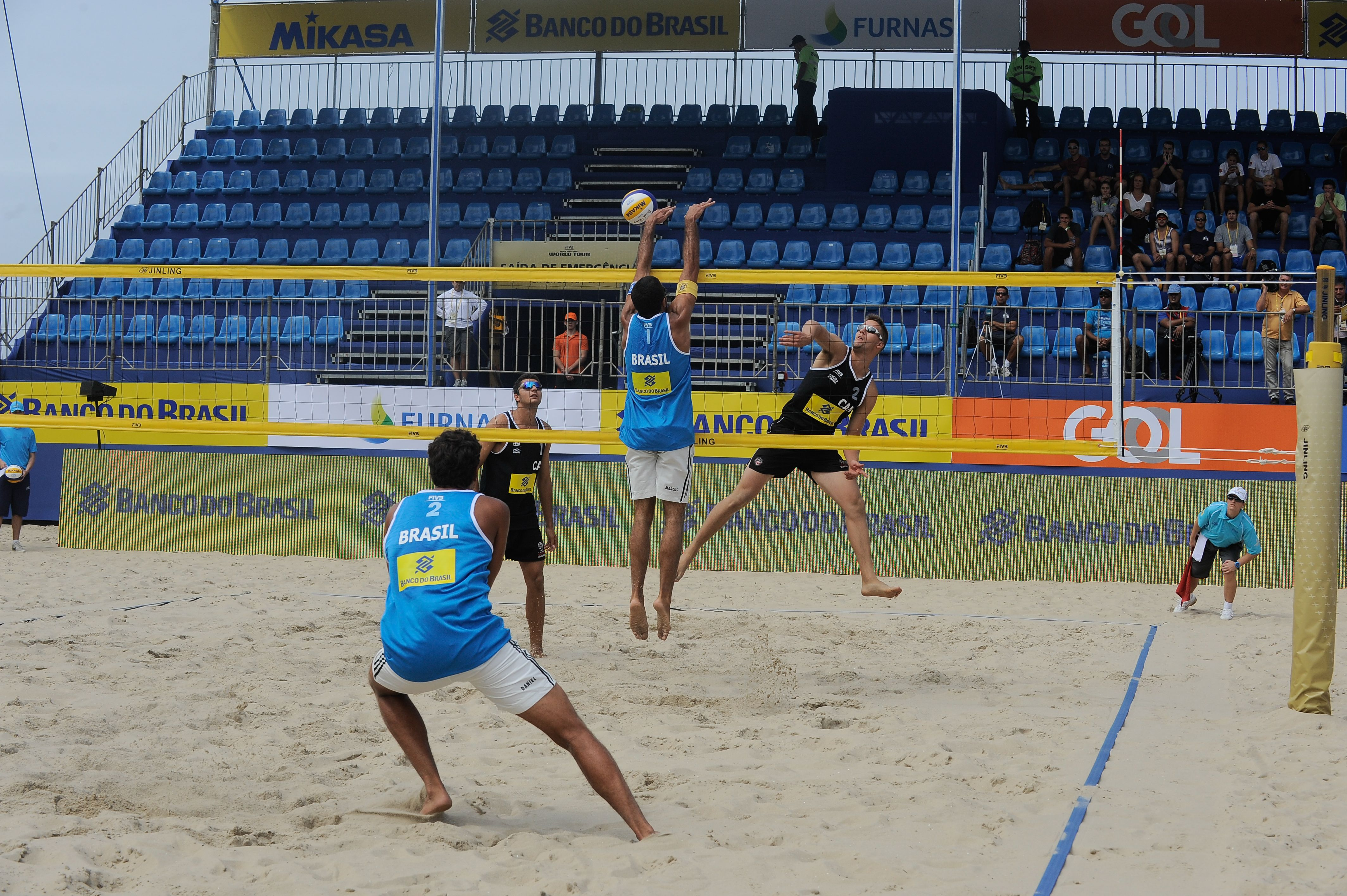 Etapa do circuito mundial de vôlei de praia (Rio Open) na Praia de Copacabana, que serve como evento-teste para os Jogos Olímpicos e Paralímpicos de 2016.